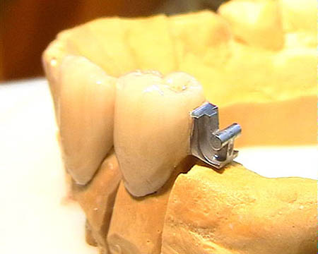 Freiendprothese, Zahnprothese